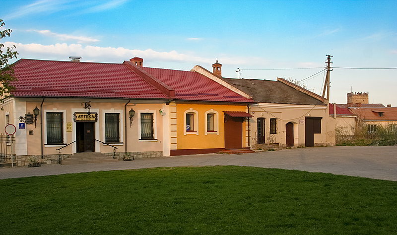 Drahomanov street